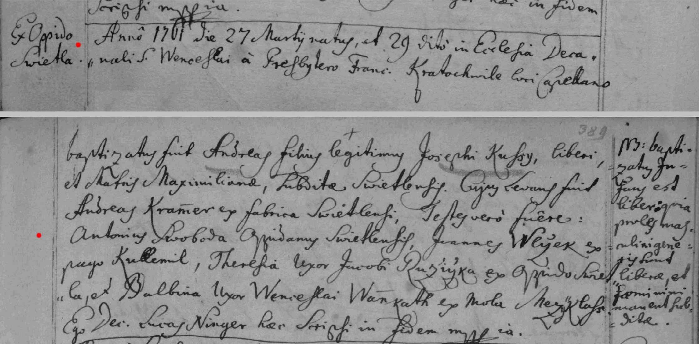 matriční zápis o narození a křtu Ondřeje Kusého (matrika N 1743-1765 Světlá nad Sázavou (SOA Zámrsk)